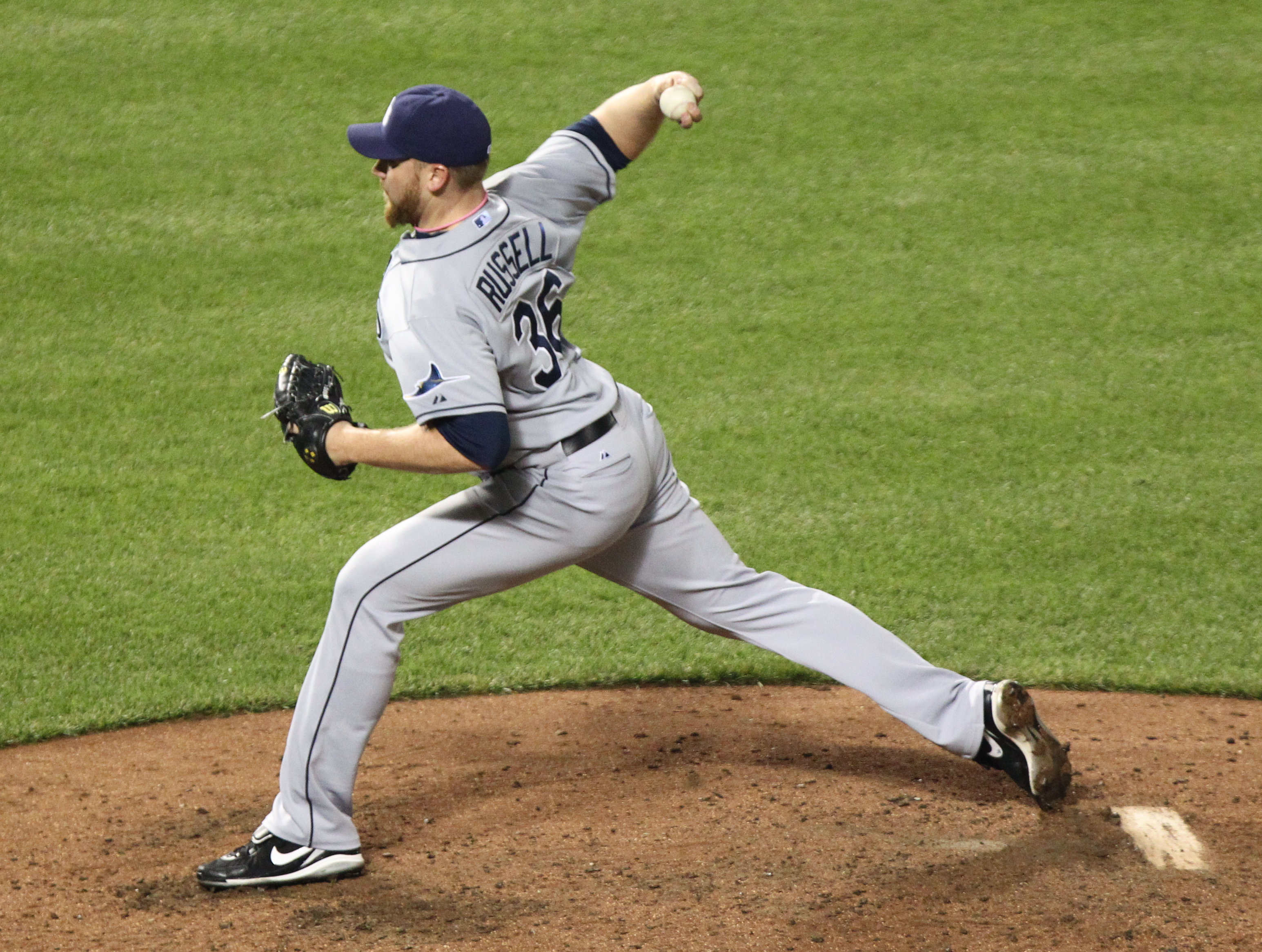 Adam Russell